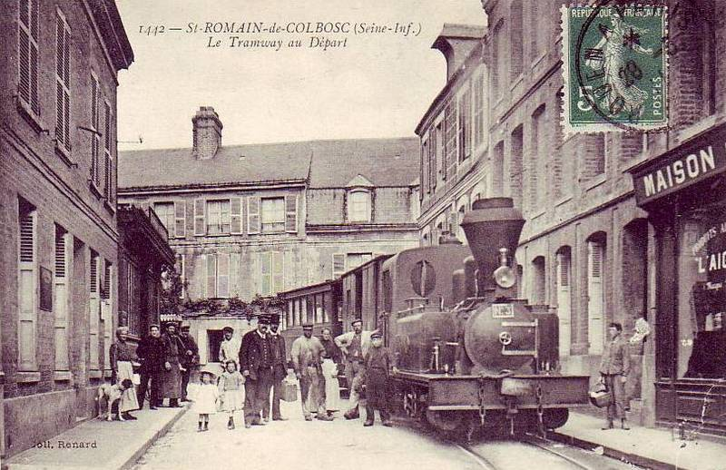 Tramway de Saint-Romain Locomotive n°3 (Corpet Louvet n°682 de 1897)